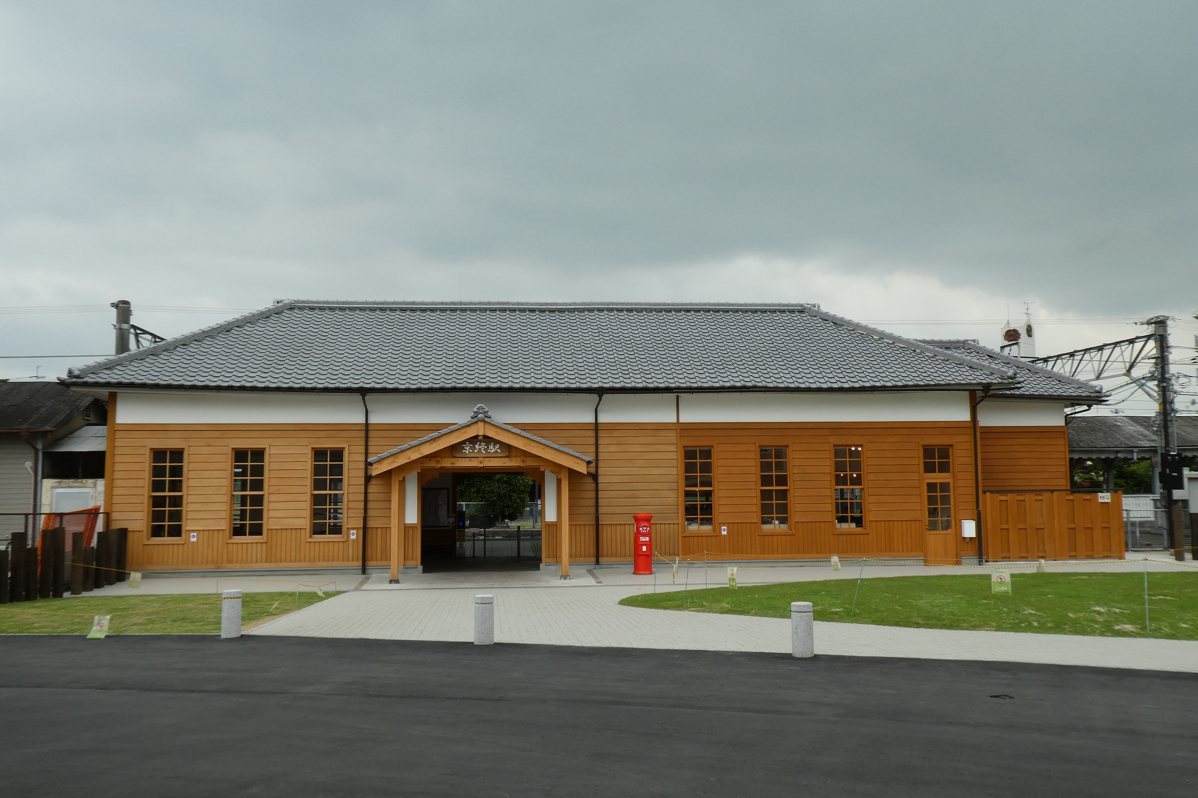 改修工事が終わった万葉まほろば線（桜井線）京終駅舎。